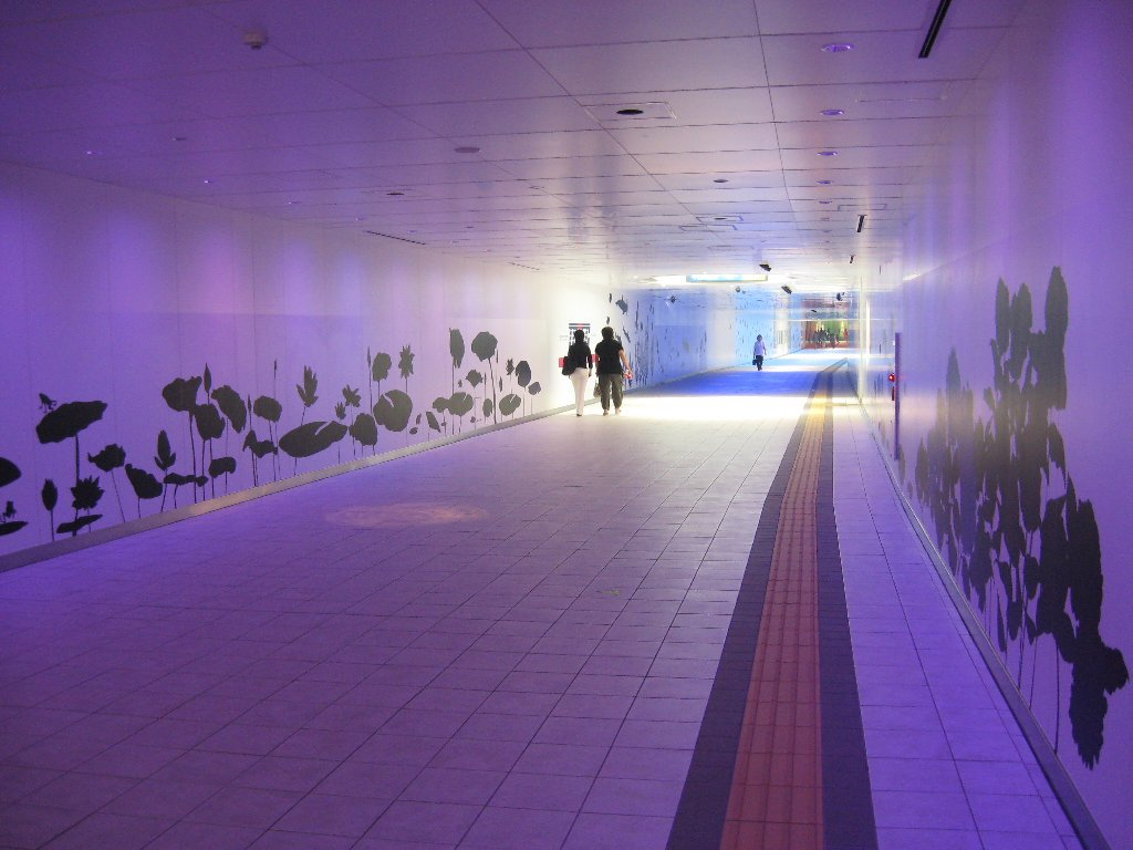 Lucent Avenue in Nagoya, Japan （名古屋市のルーセントアベニュー）